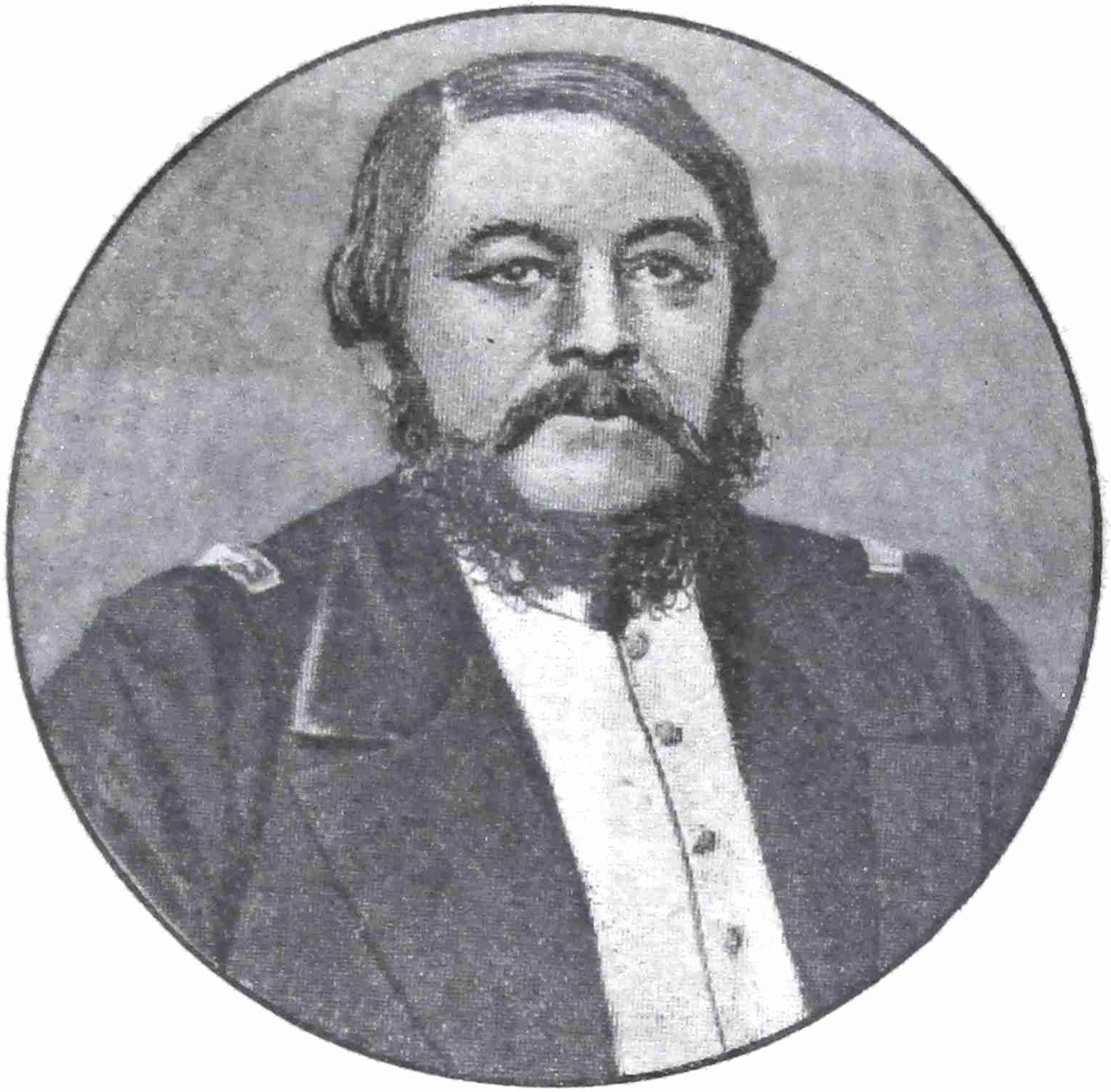 General Don Nicanor Cáceres.